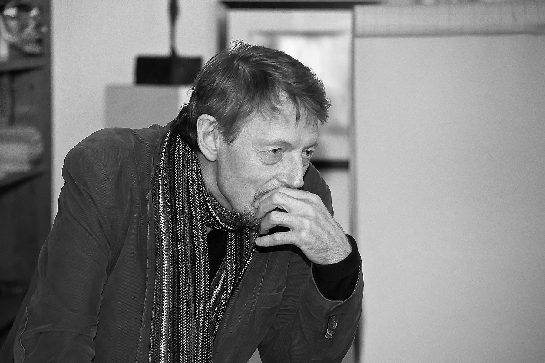 Reinhard Knodt Schriftsteller im Schnackenhof 2016